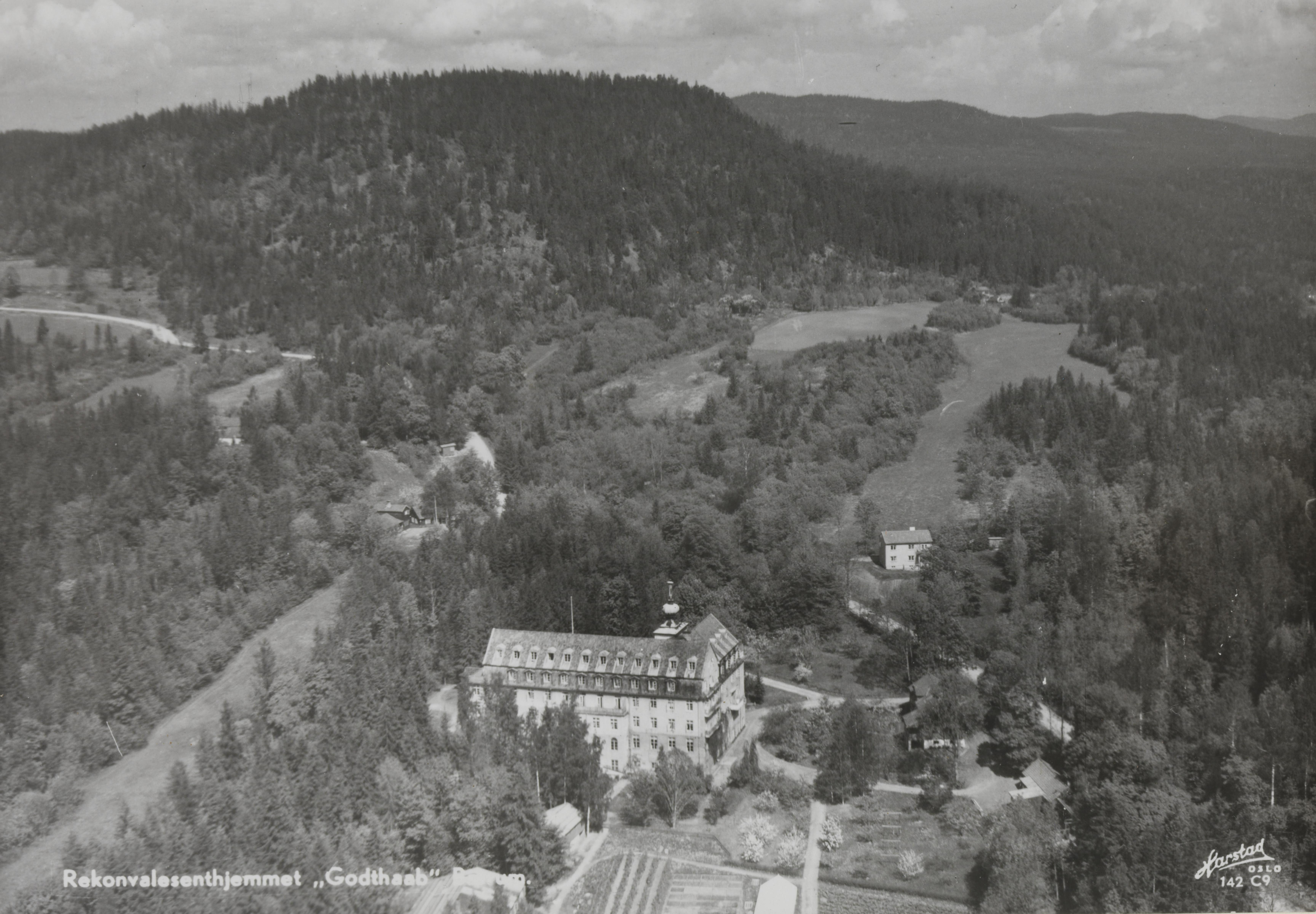 Bildet er hentet fra Nasjonalbibliotekets bildesamling Bærum, Bærum, Akershus